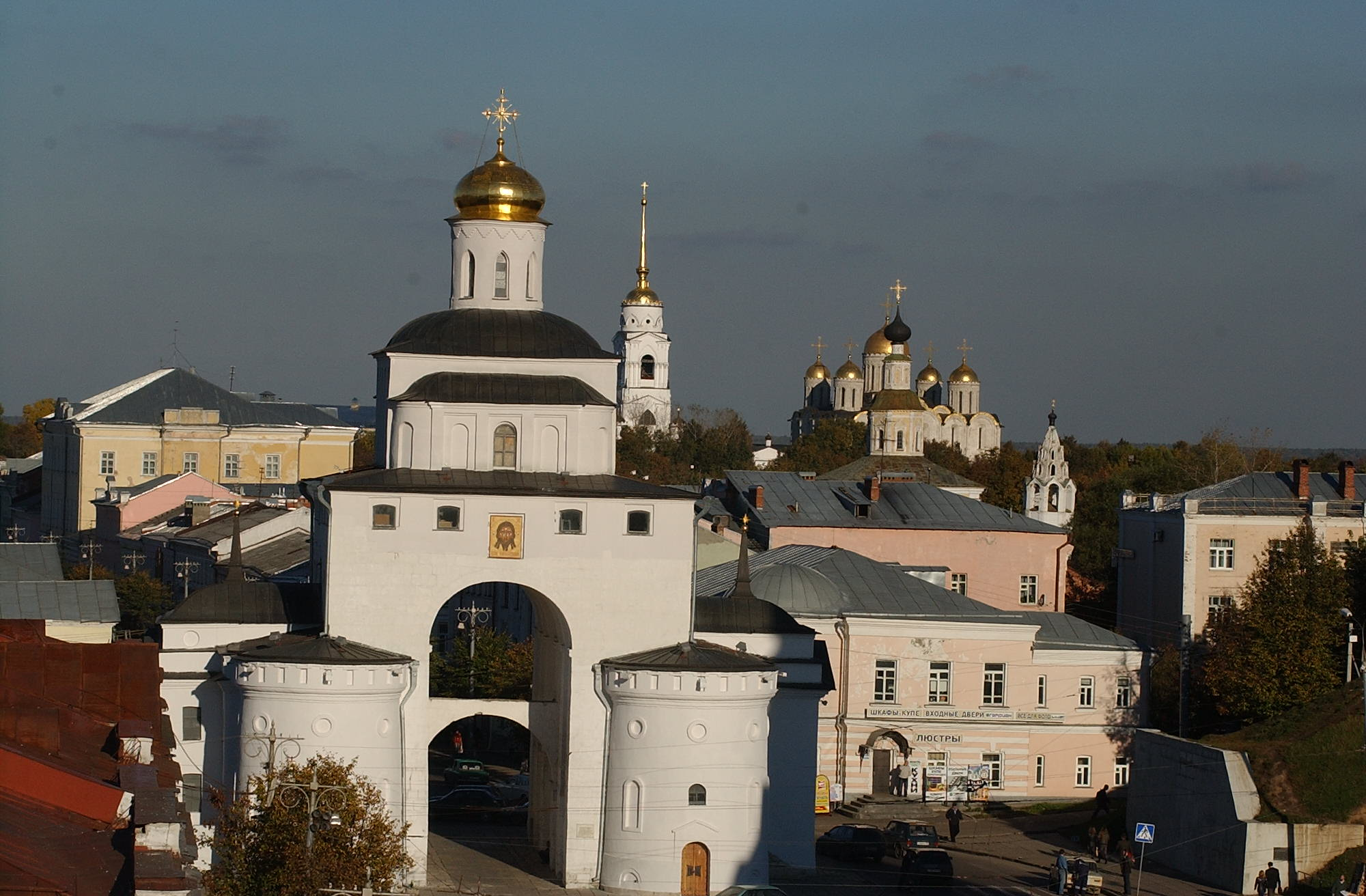 Золотые ворота